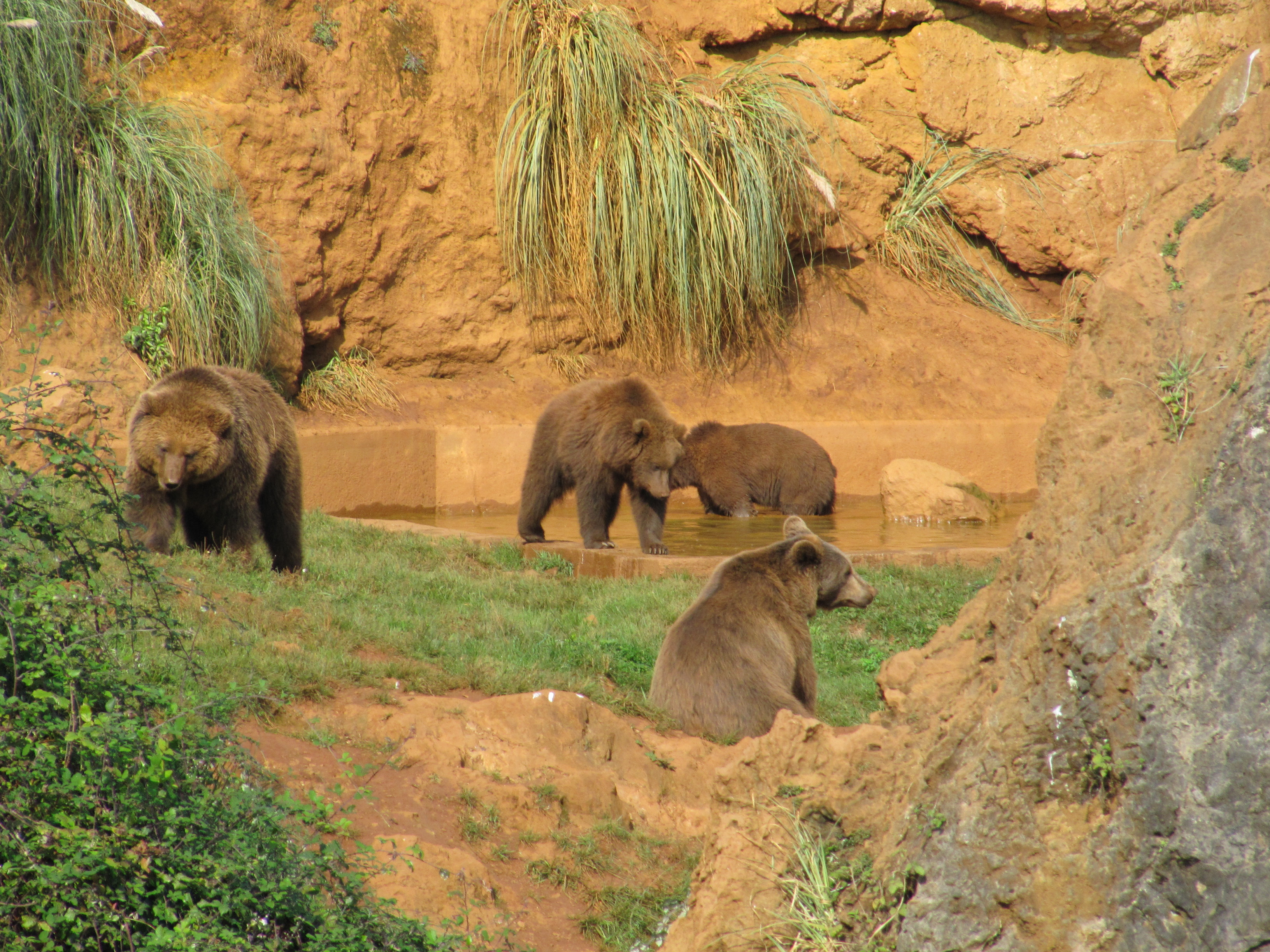 foto de osos en el parque de la naturaleza de cabarceno, Spain